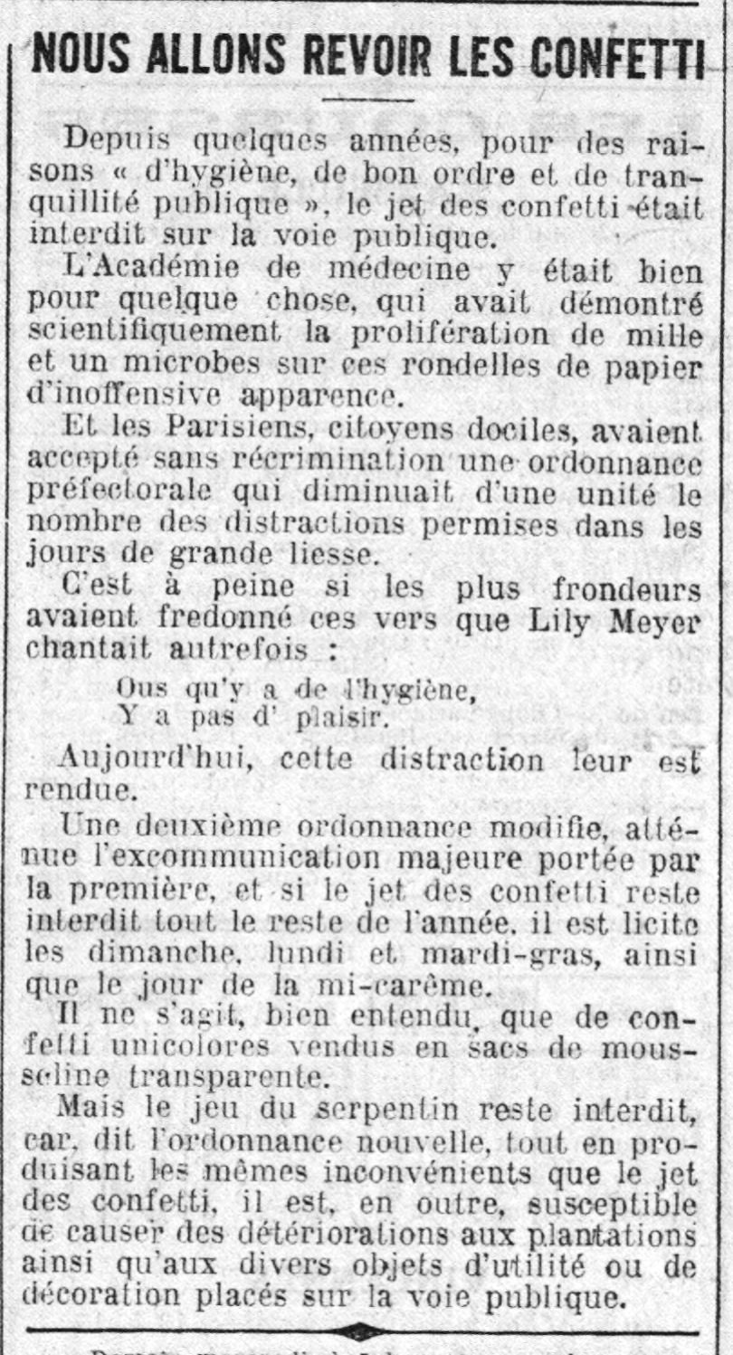 Annonce de l'autorisation des confettis au Carnaval de Paris 1922.